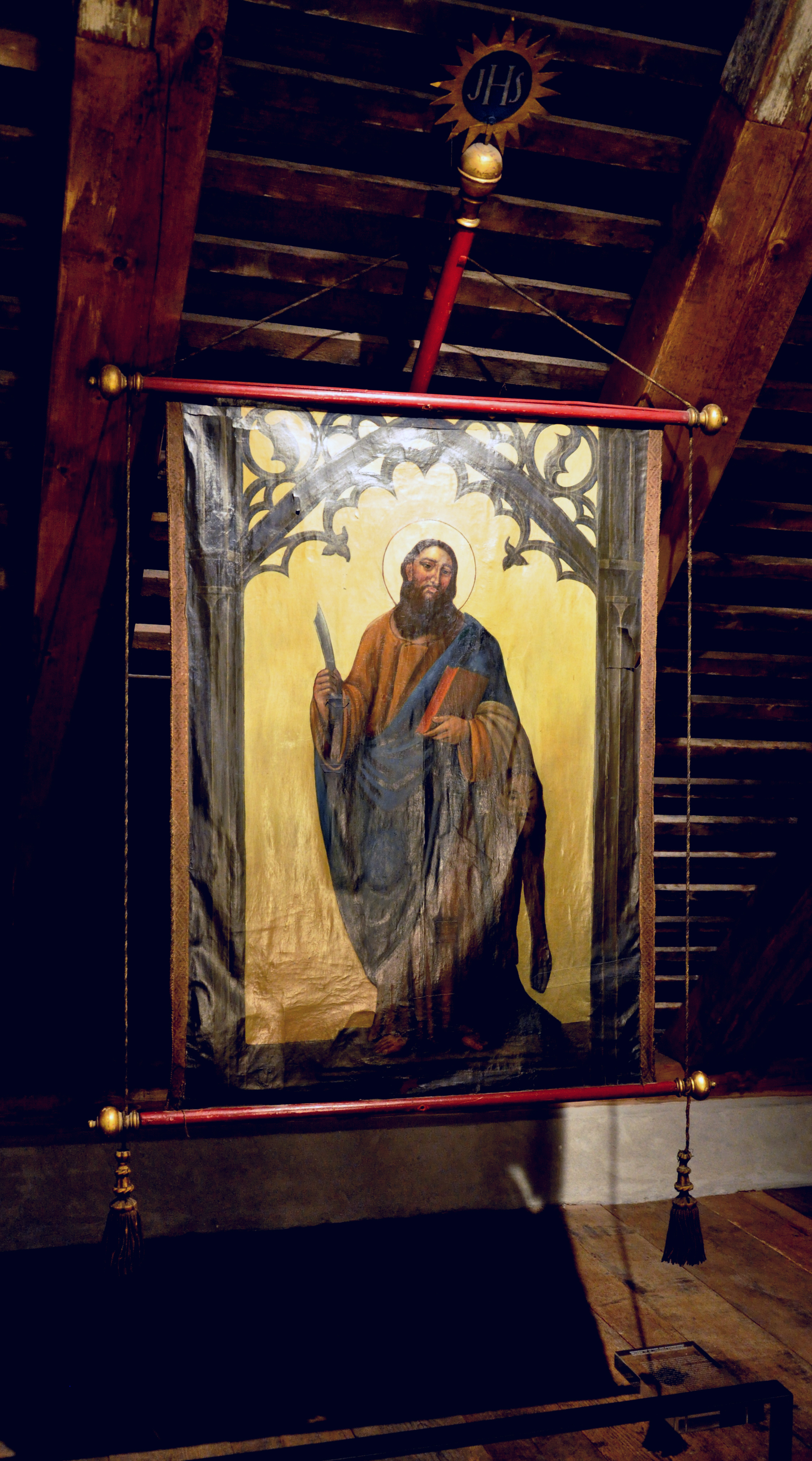 Ravensburg, Museum Humpisquartier, Fahne der katholischen Bruderschaft der Metzger (Leihgabe: Kath. Kirchengemeinde Liebfrauen Ravensburg) Museum Humpis-Quartier Native nameMuseum Humpis-QuartierLocationRavensburg, GermanyCoordinates47° 46′ 50″ N, 9° 36′ 56″ E Established2009Website control : Q1637298 VIAF: 128828875 LCCN: nb2007020847 GND: 4565586-8 WorldCat